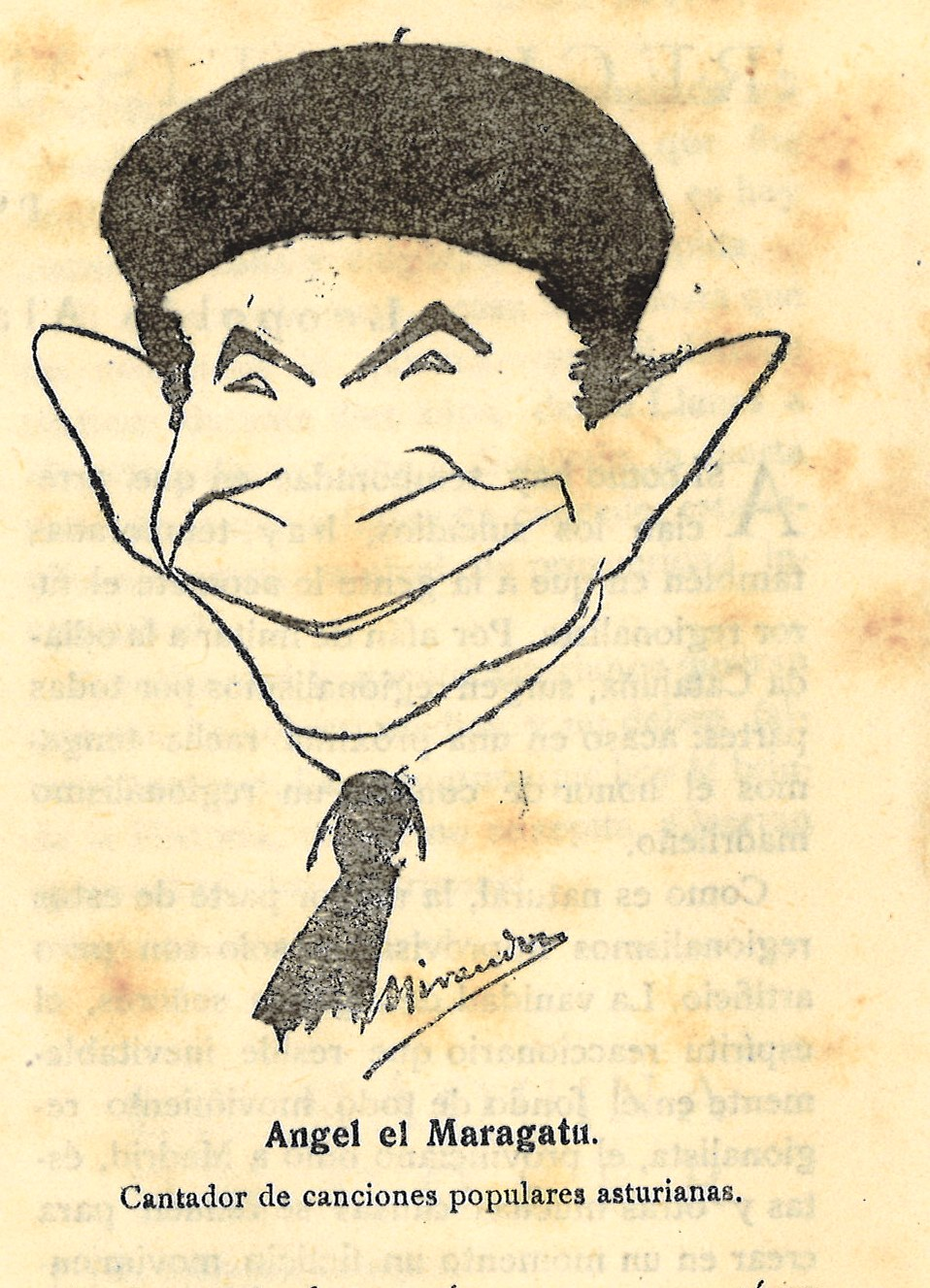 Caricatura de Ángel González Rodríguez "El Maragatu", aparecida en el número 275 del 7 de agosto de 1920 de "España: semanario de la vida nacional"